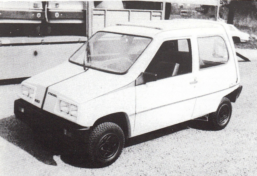 DUPORT minicar